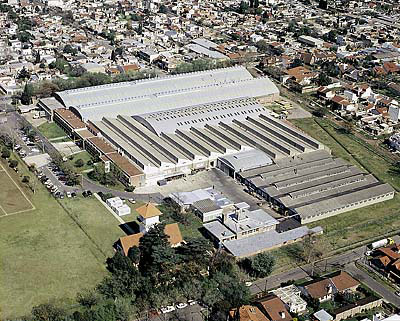 Vista aérea de la fábrica Orbis en Villa Adelina (Buenos Aires, Argentina)